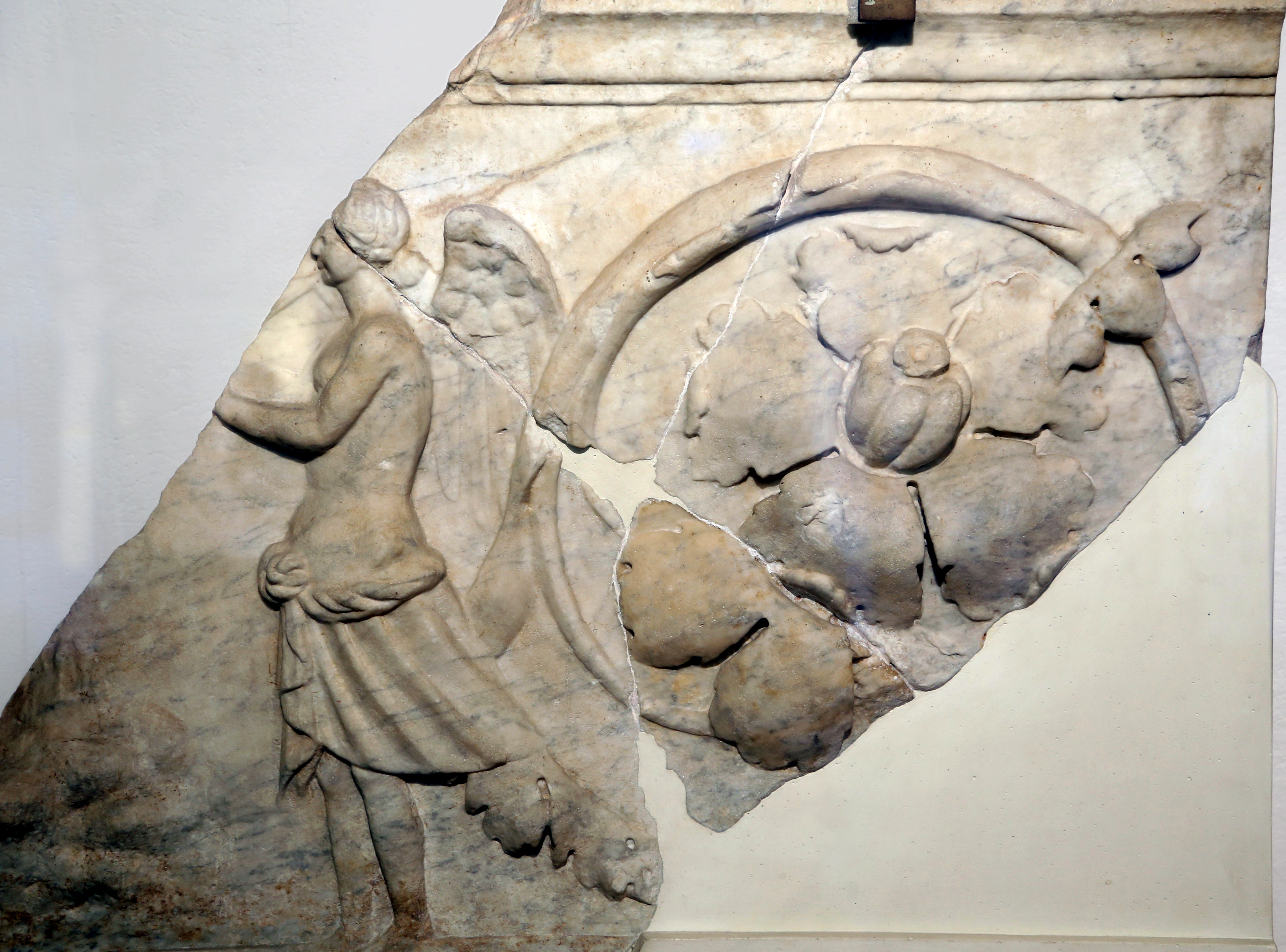 Fragment, Archäologisches Museum, Fiesole, Fragment eines römischen Reliefs mit der Darstellung einer Sirene vor einer Feuerstelle. Das Bauteil stammt aus dem Theater von Faesulum.